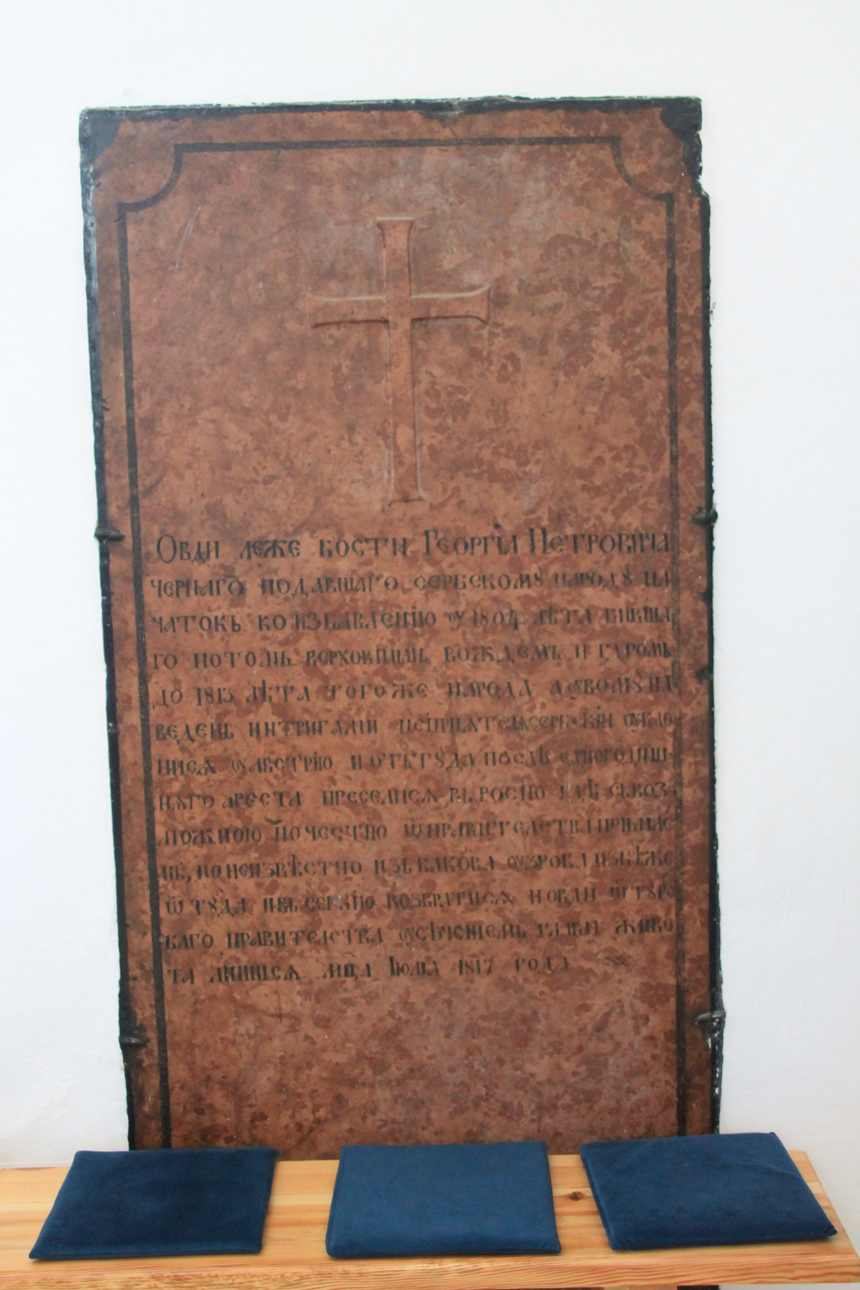 Karadjordjeva crkva (Topola)